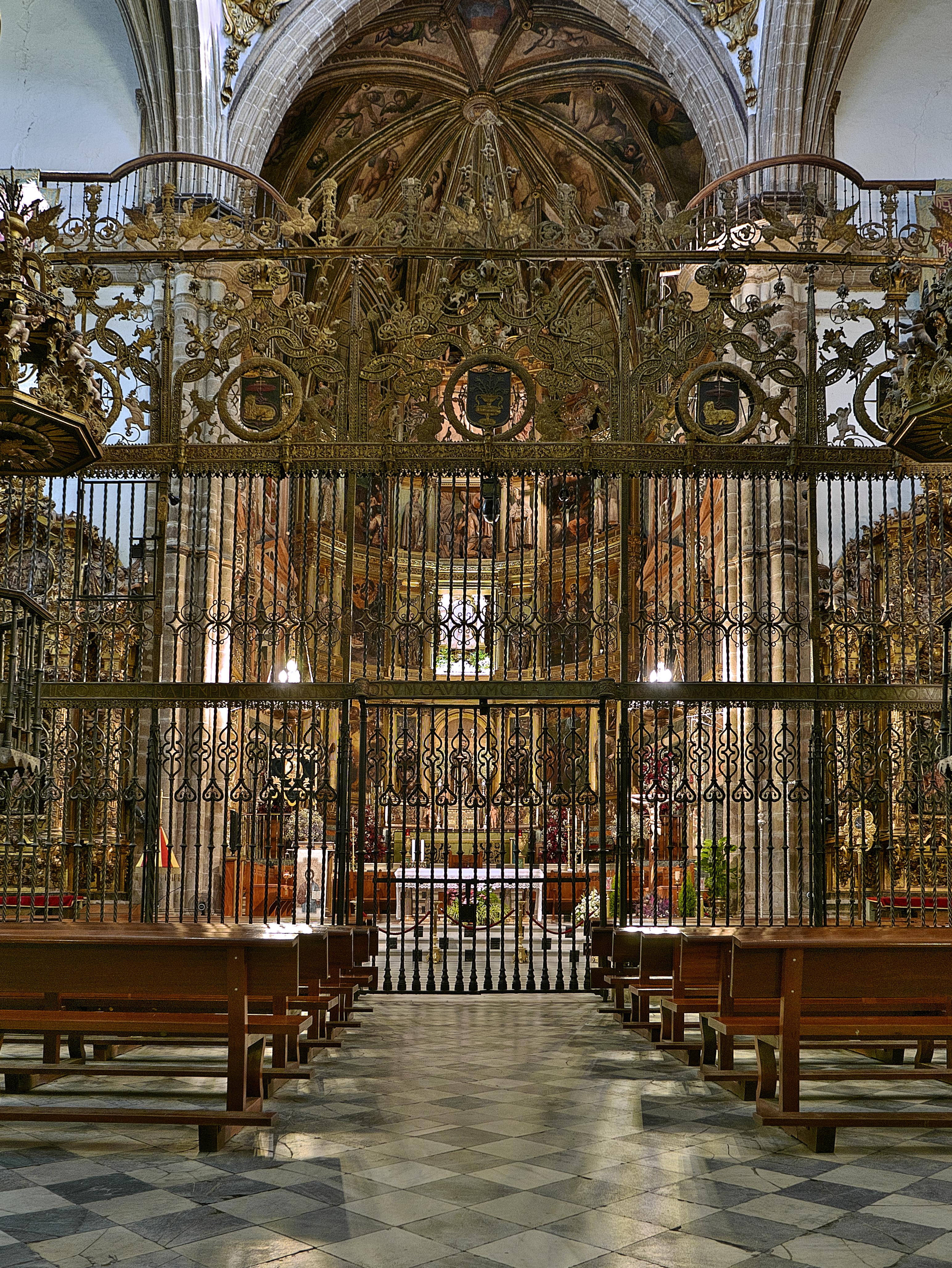 Reja del presbiterio de la iglesia del Real Monasterio de Santa María de Guadalupe, obra (1510-1514) de fray Francisco de Salamanaca y fray Juan de Álava.